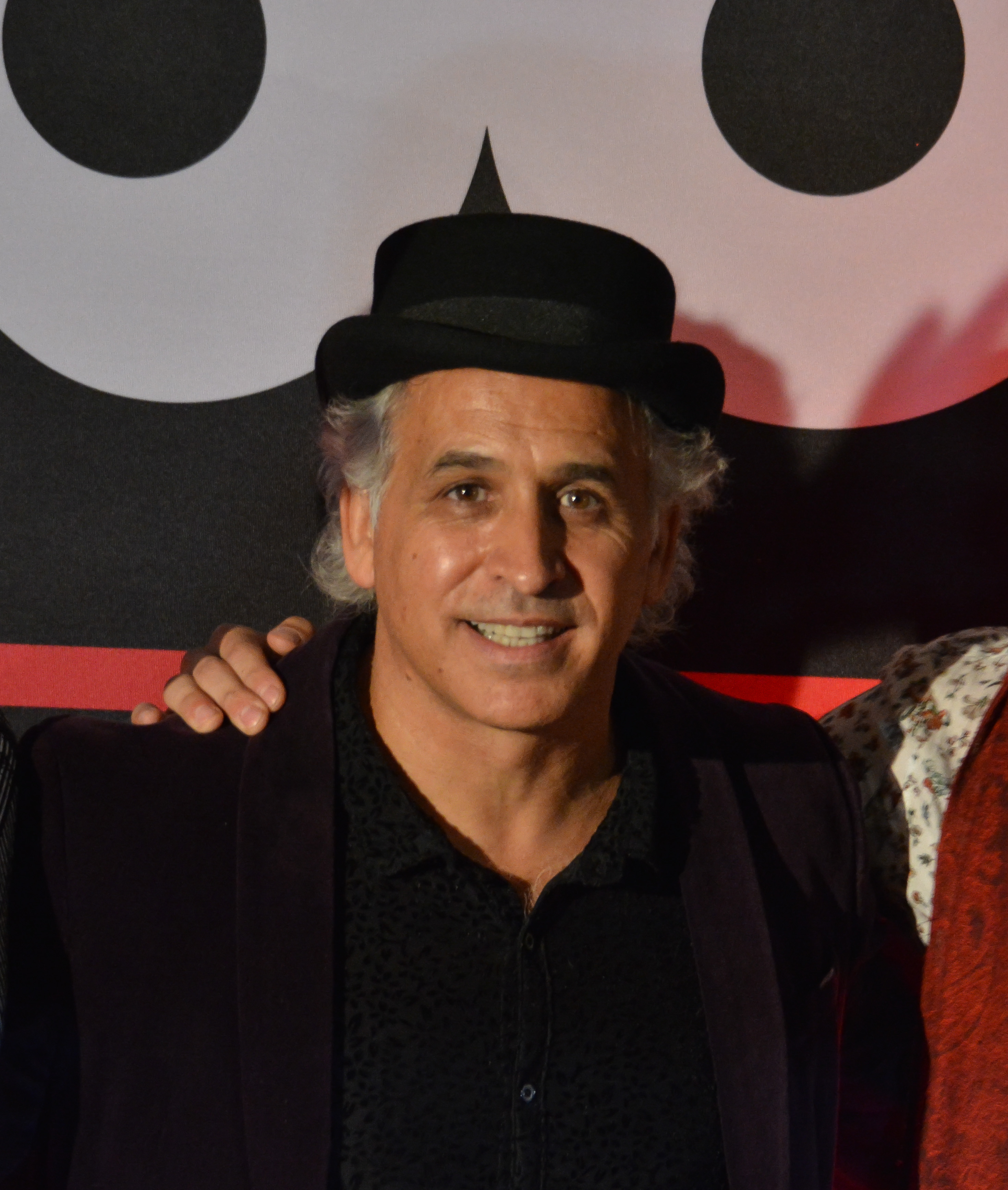 Gala Billboard Latin Music Showcase Chile 2018, Hotel Santiago, Santiago, Chile